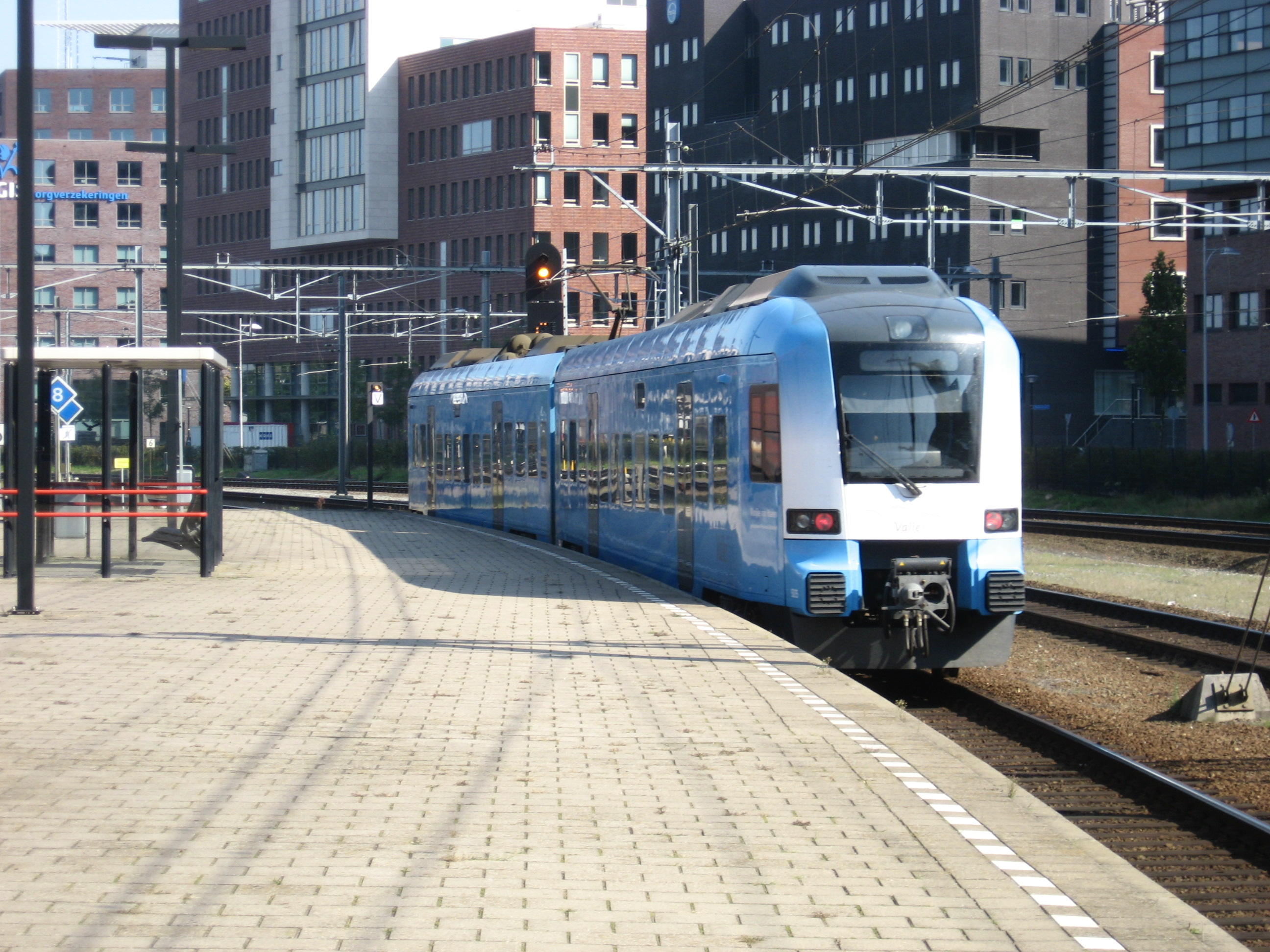 Elektrisch treinstel van de Valleilijn in Amersfoort.